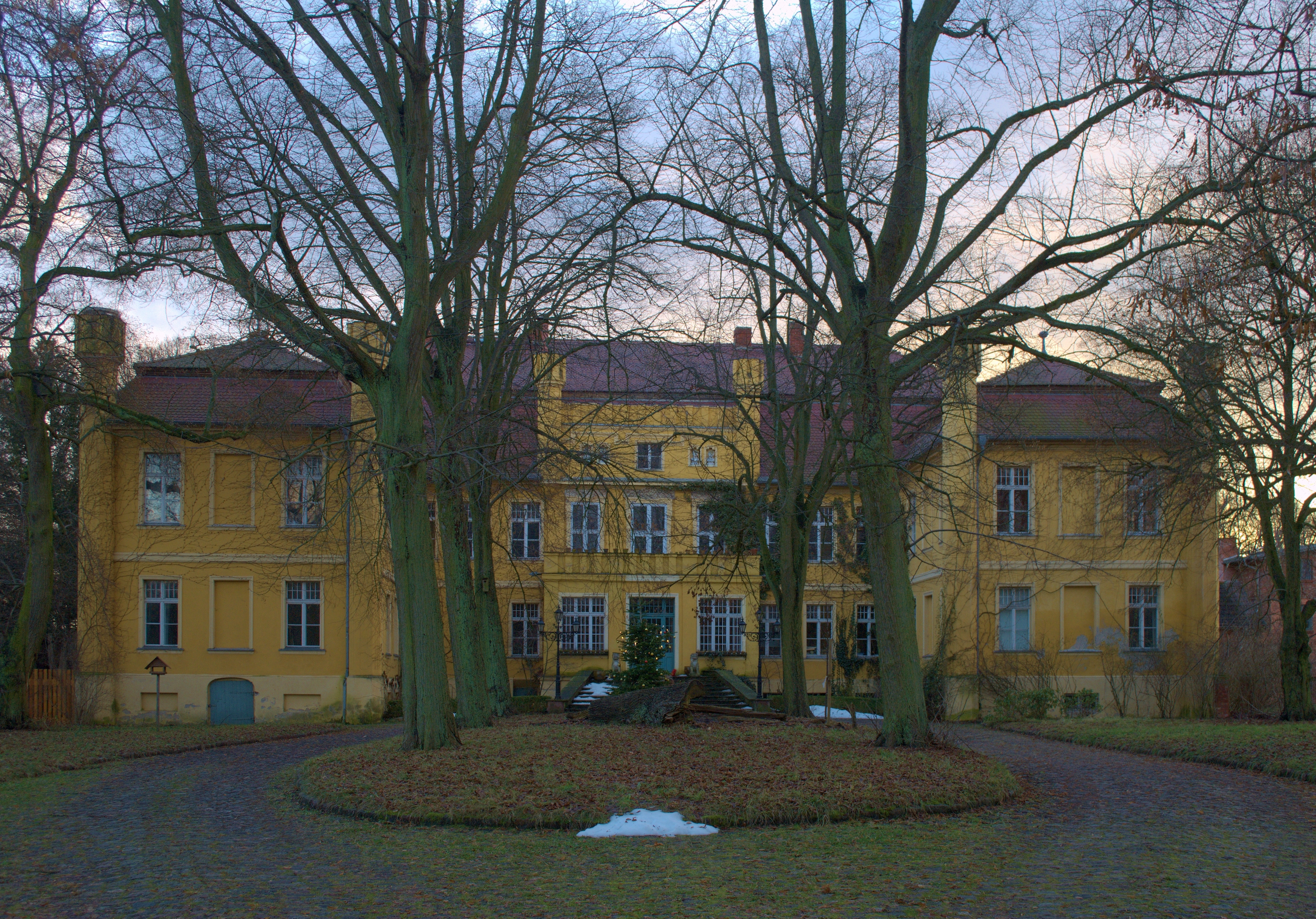 Hauptgebäude der Gutsanlage Wartin.